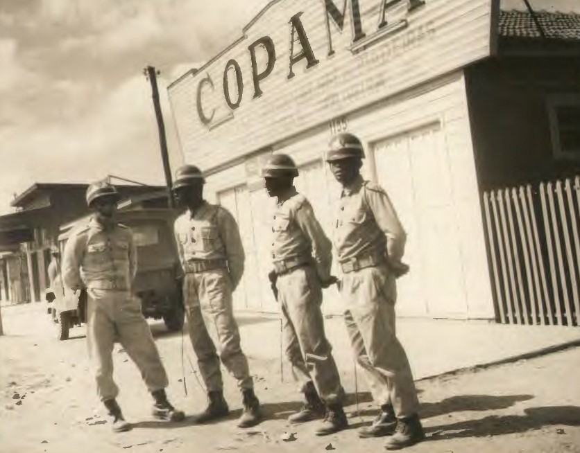 Fotografia do Fundo Correio da Manhã, sob a guarda do Arquivo Nacional.